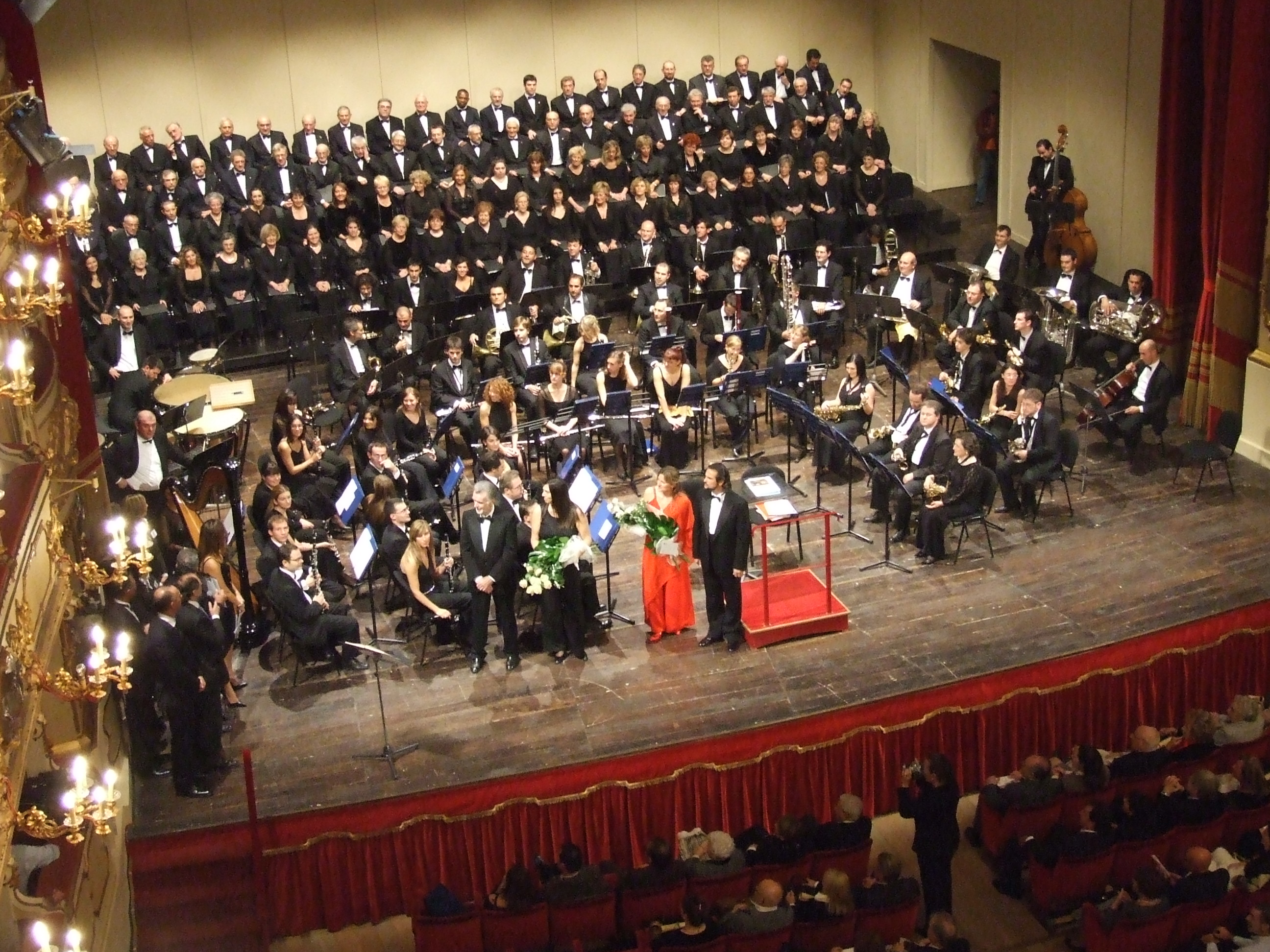 Banda Civica Musicale di Soncino durante il Concerto de "I grandi cori del melodramma" al Teatro Ponchielli con il Coro Ponchielli Vertova, 25 febbraio 2006.